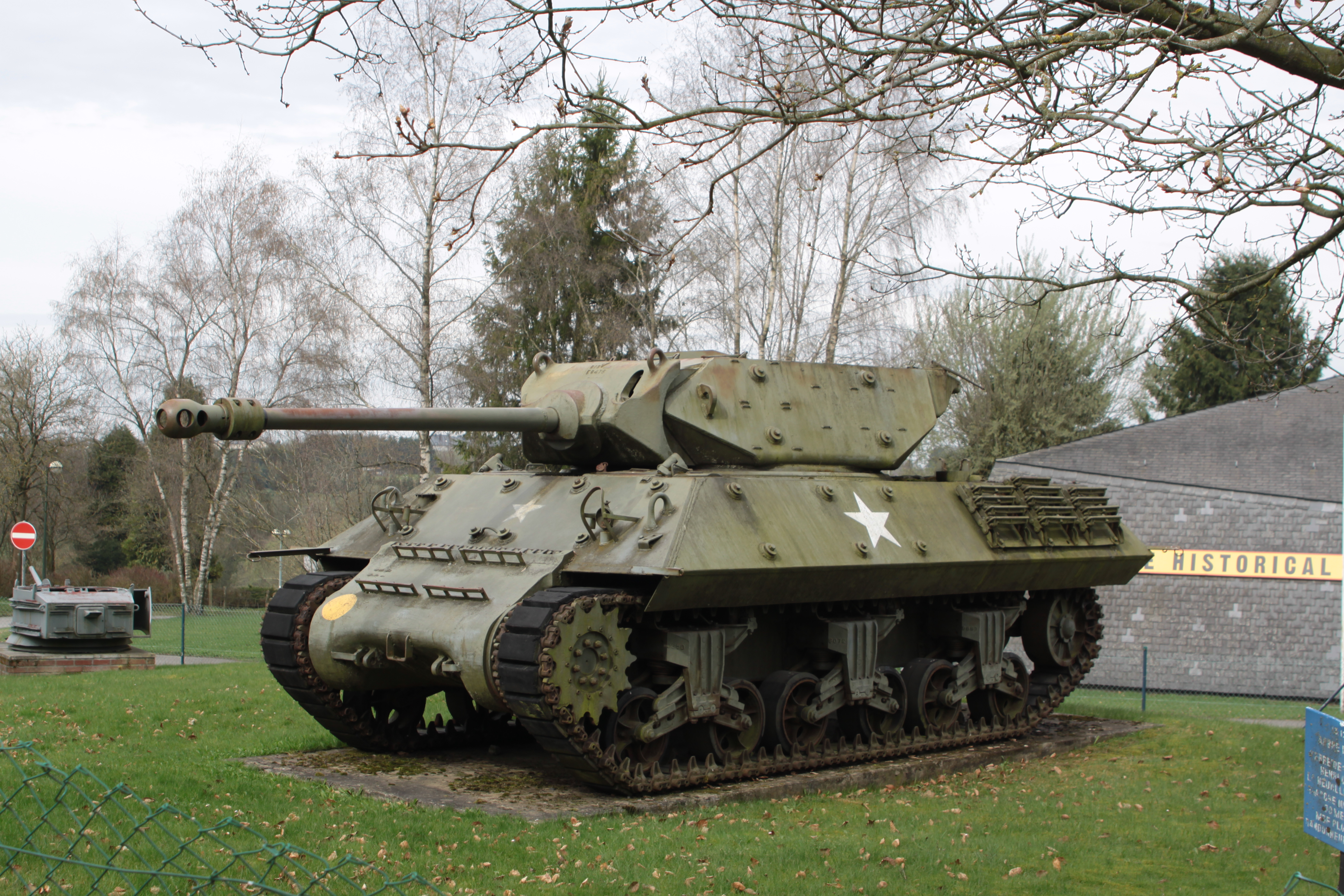 M10 Tank Destroyer à Bastogne